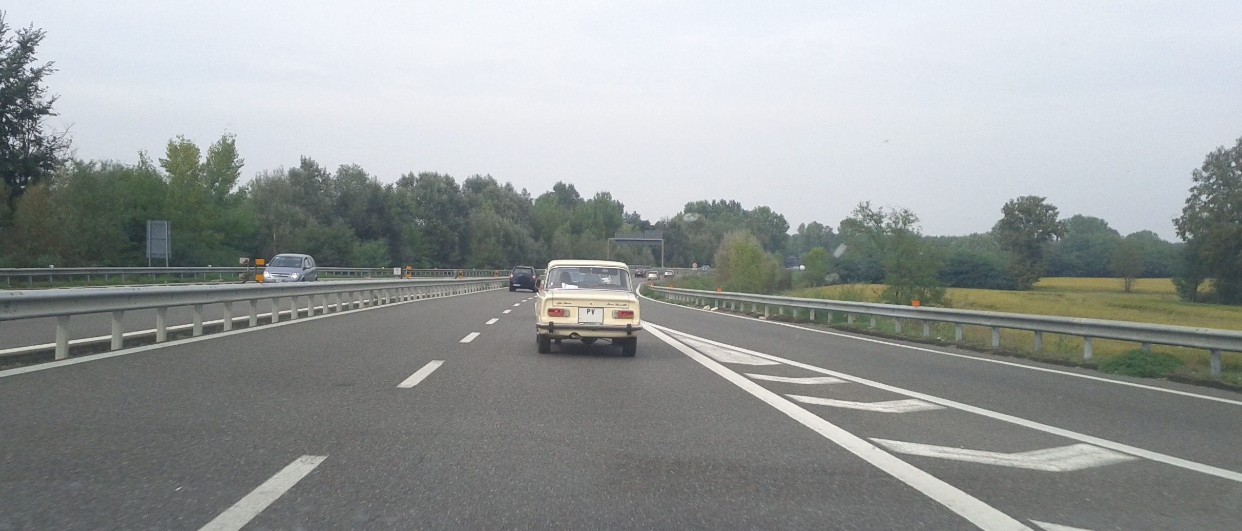 L'autostrada A54 nel territorio comunale di San Martino Siccomario.